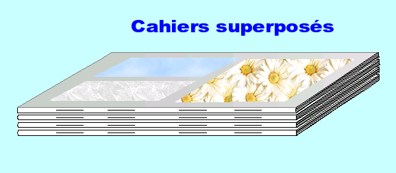 dessin perso libre de droit